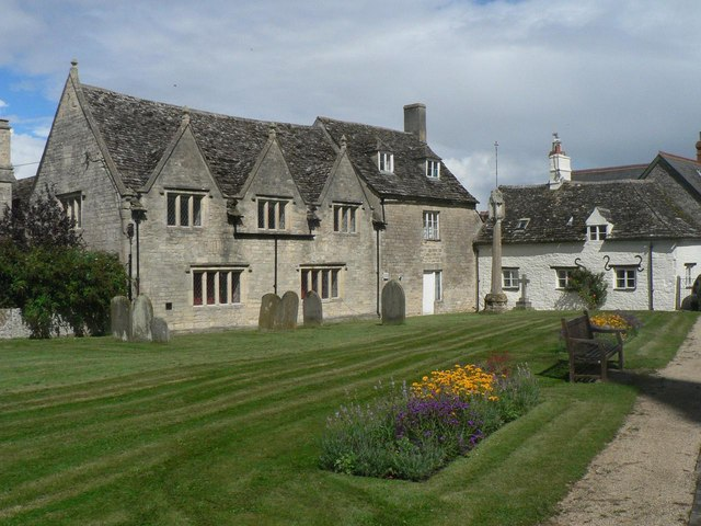 Cricklade: old school